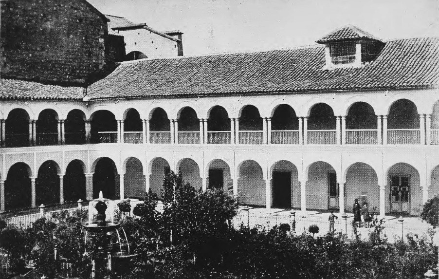 Bogota, patio du couvent Santo Domingo